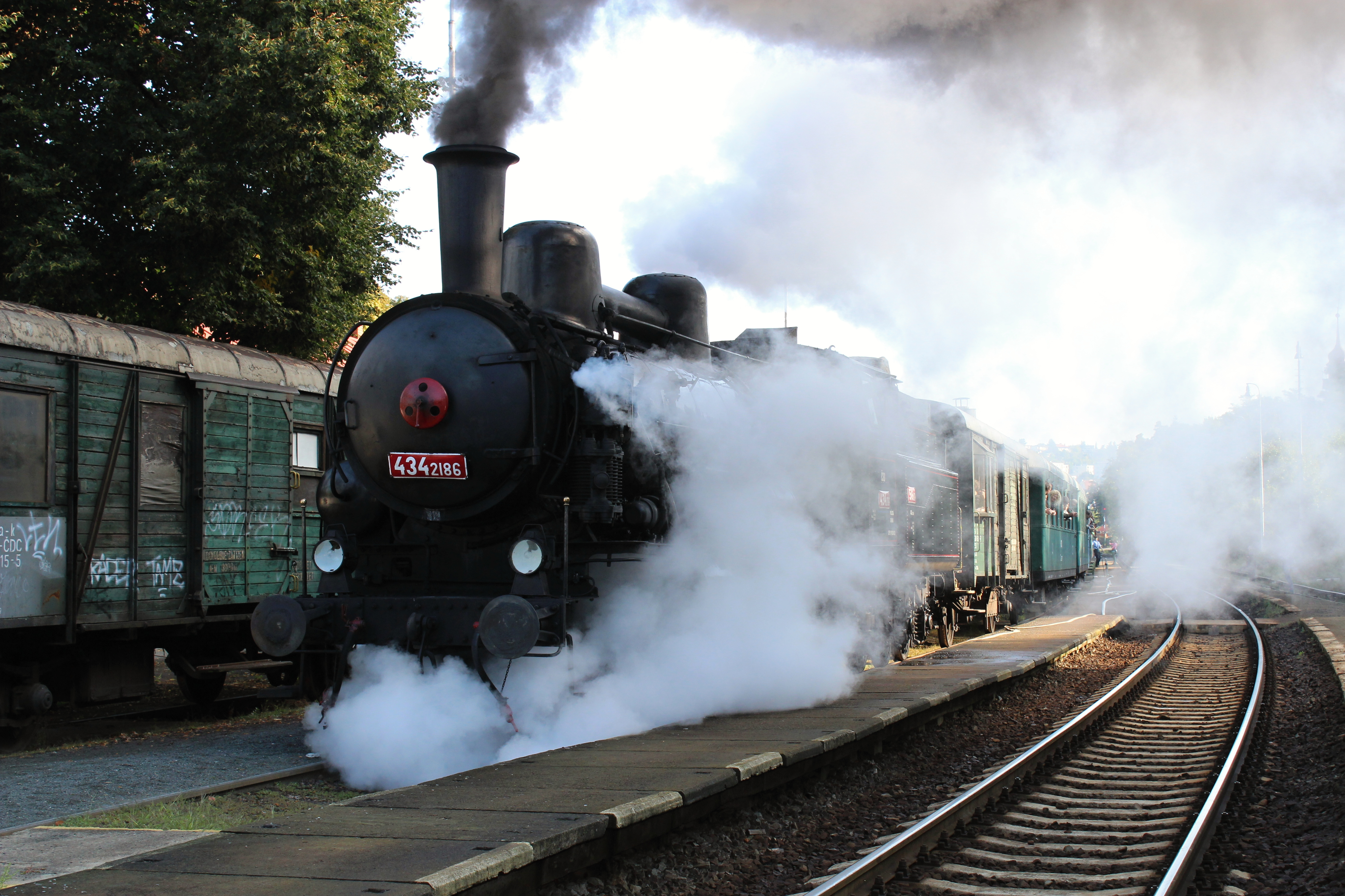 Parní lokomotiva 4342186 – Čtyřkolák před nostalgickou jízdou na nádraží Praha – Braník 30. 8. 2014 v 8.57 nostalgická jízda na trati Praha – Braník – Čerčany a zpět. Číslo stroje: 4343186 – na kotli ČSD 4342186 – na boku Údaje na originálním výrobním štítku: Výrobce: Akc. spol. strojírny dříve BREITFELD, DANĚK i spol. Slaný Č.: 95 Rok výroby: 1917 Provozovatel: Pražská dráha Depo Vršovice Více na